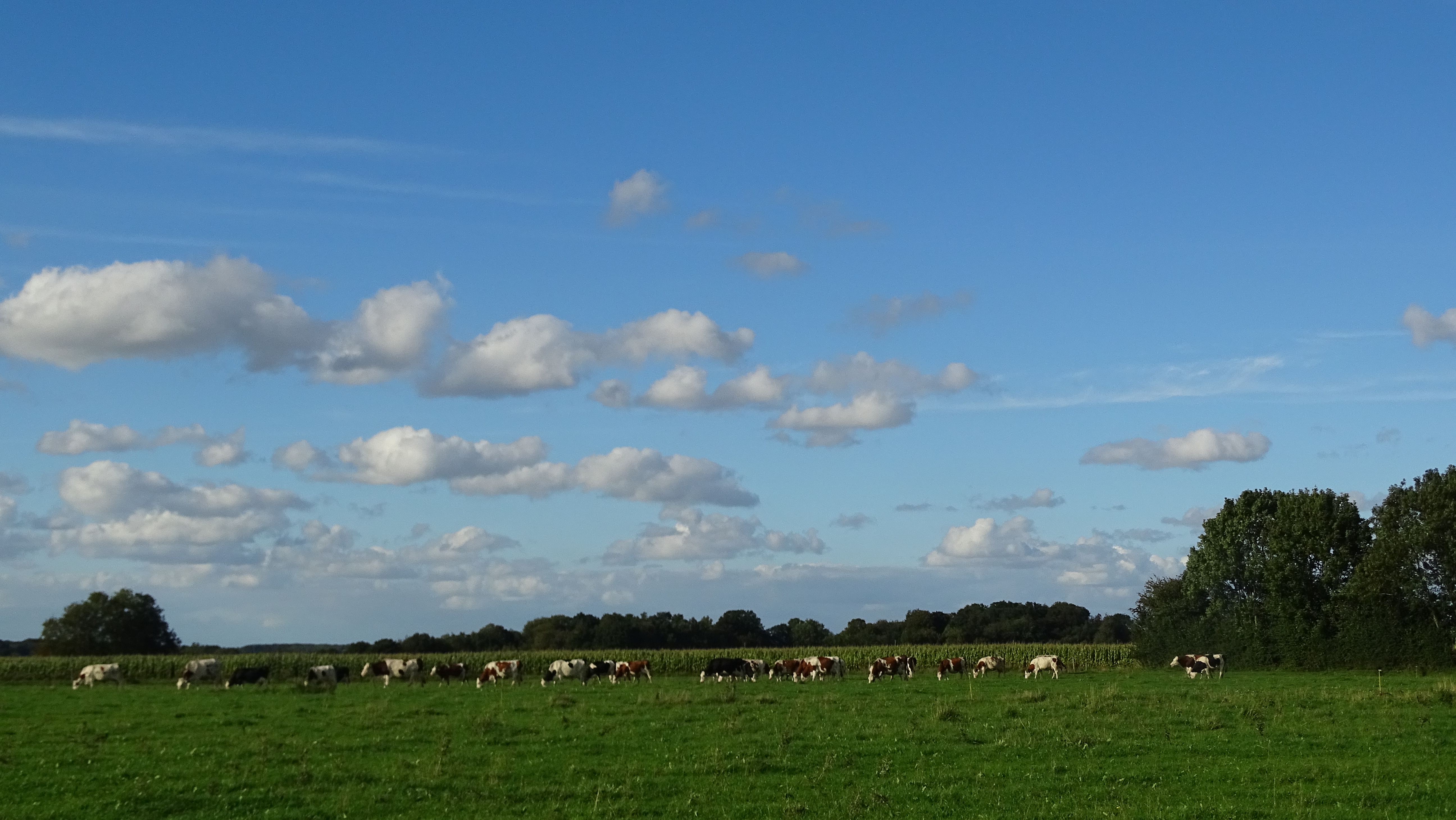 troupeau de vaches laitières